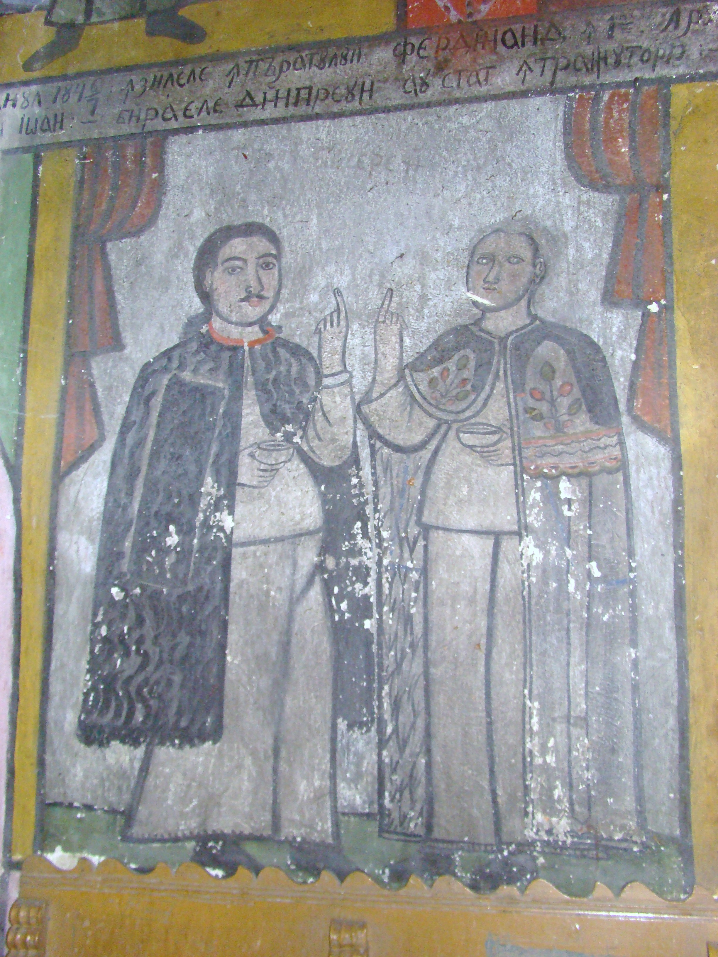 Biserica „Nașterea Maicii Domnului” din Homorog, județul Bihor